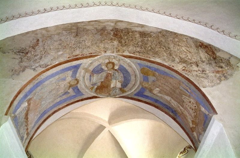 Ørridslev Kirke, Korbue